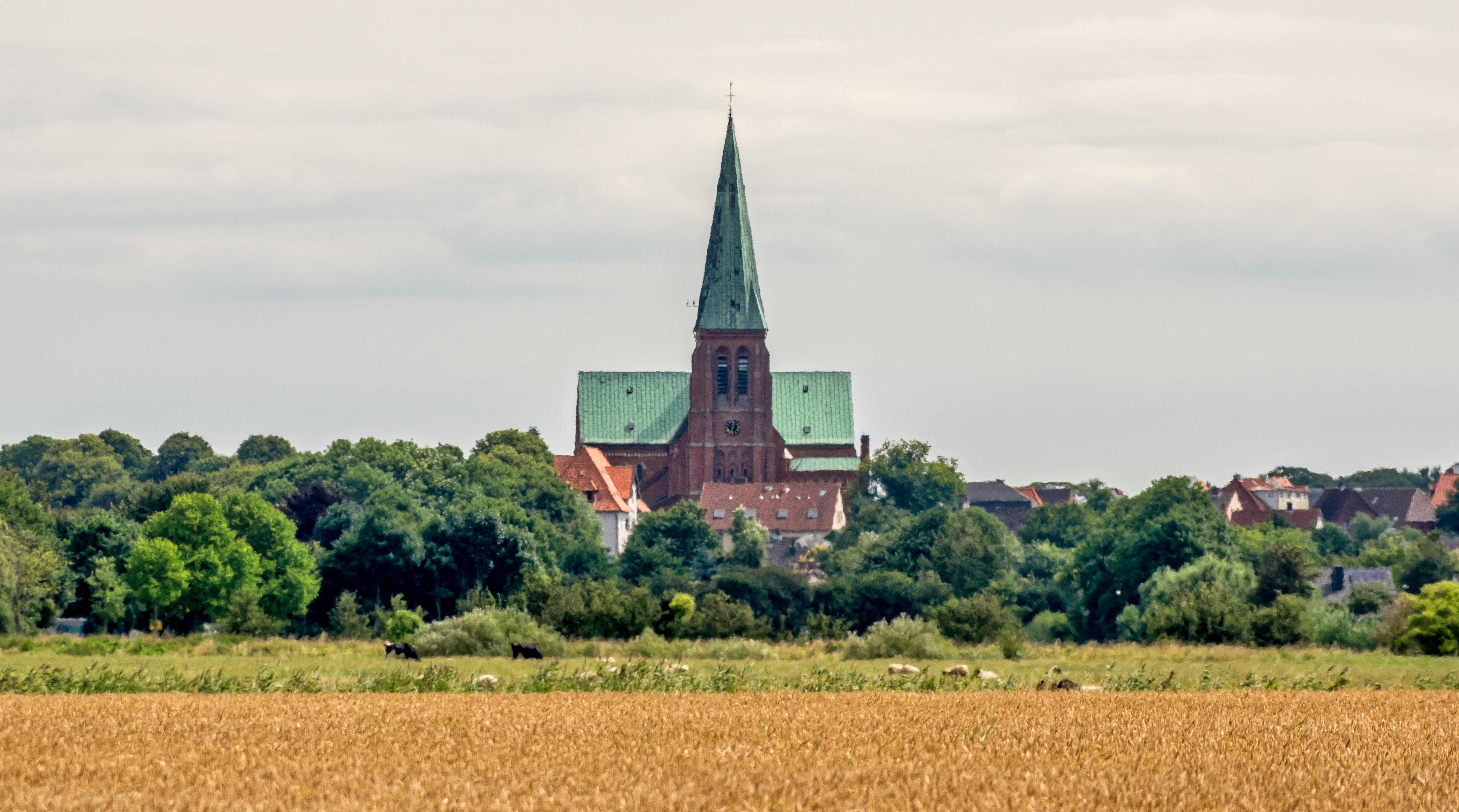 Bilder aus Meldorf Die Sankt Johannis Kirche in Meldorf auch Meldorfer Dom genannt